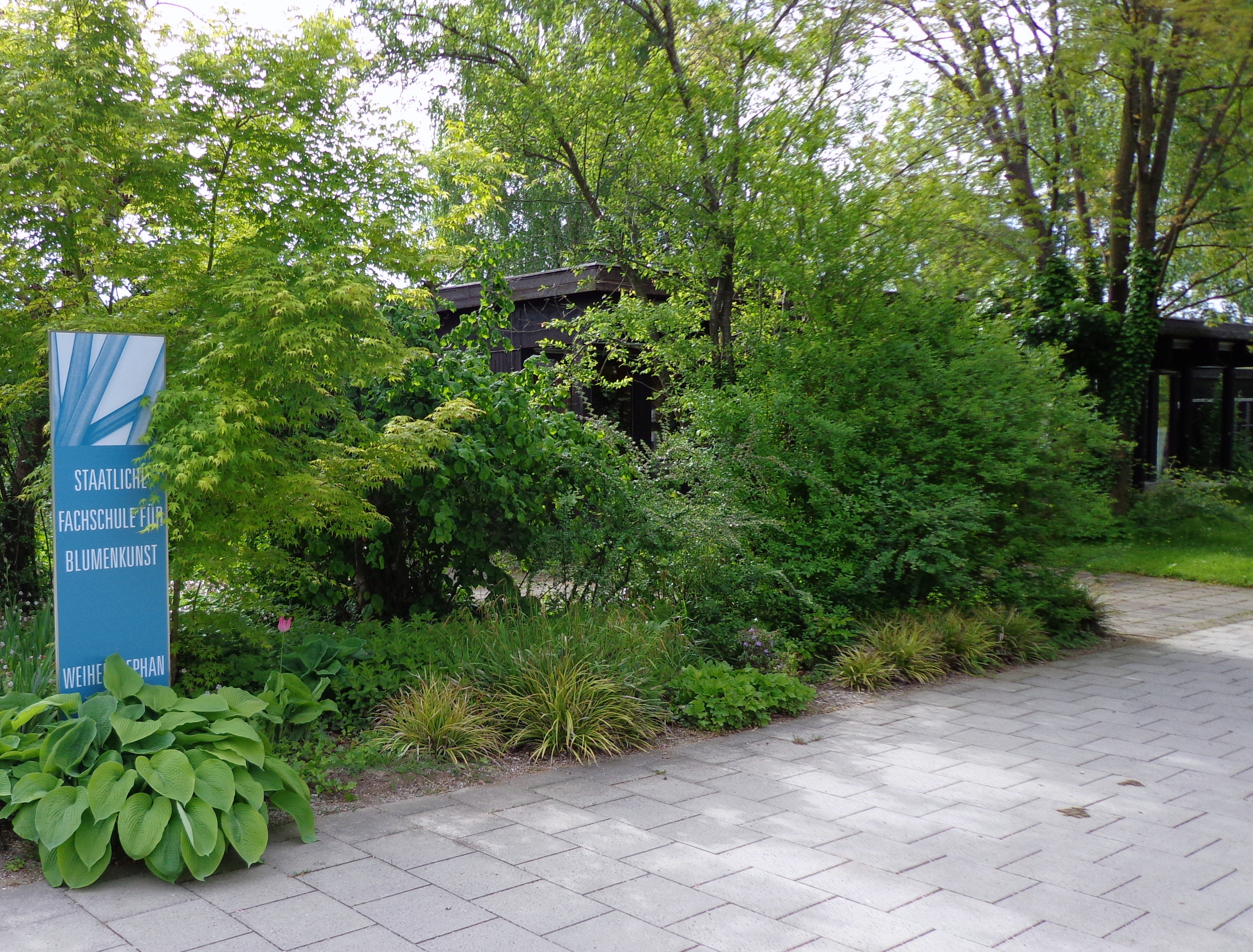 Diese Fachschule für Blumenkunst dient der Ausbildung von Floristen, die dann Führungspositionen besetzen können.